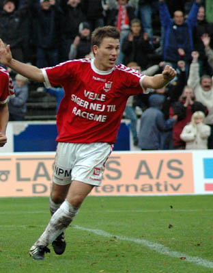 Ulrik Balling